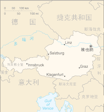 奥地利 en wiki + 翻译地名